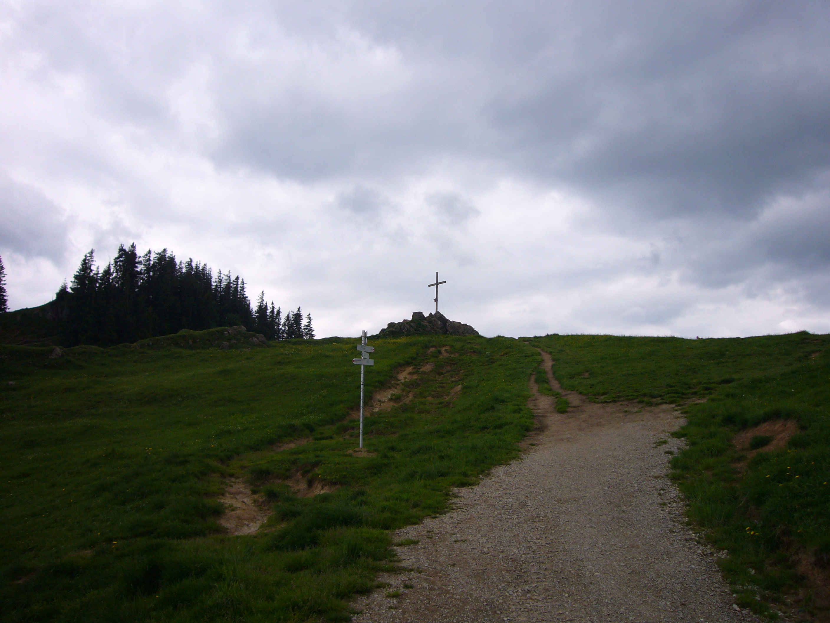 Bärenköpfle in der Nagelfluhkette